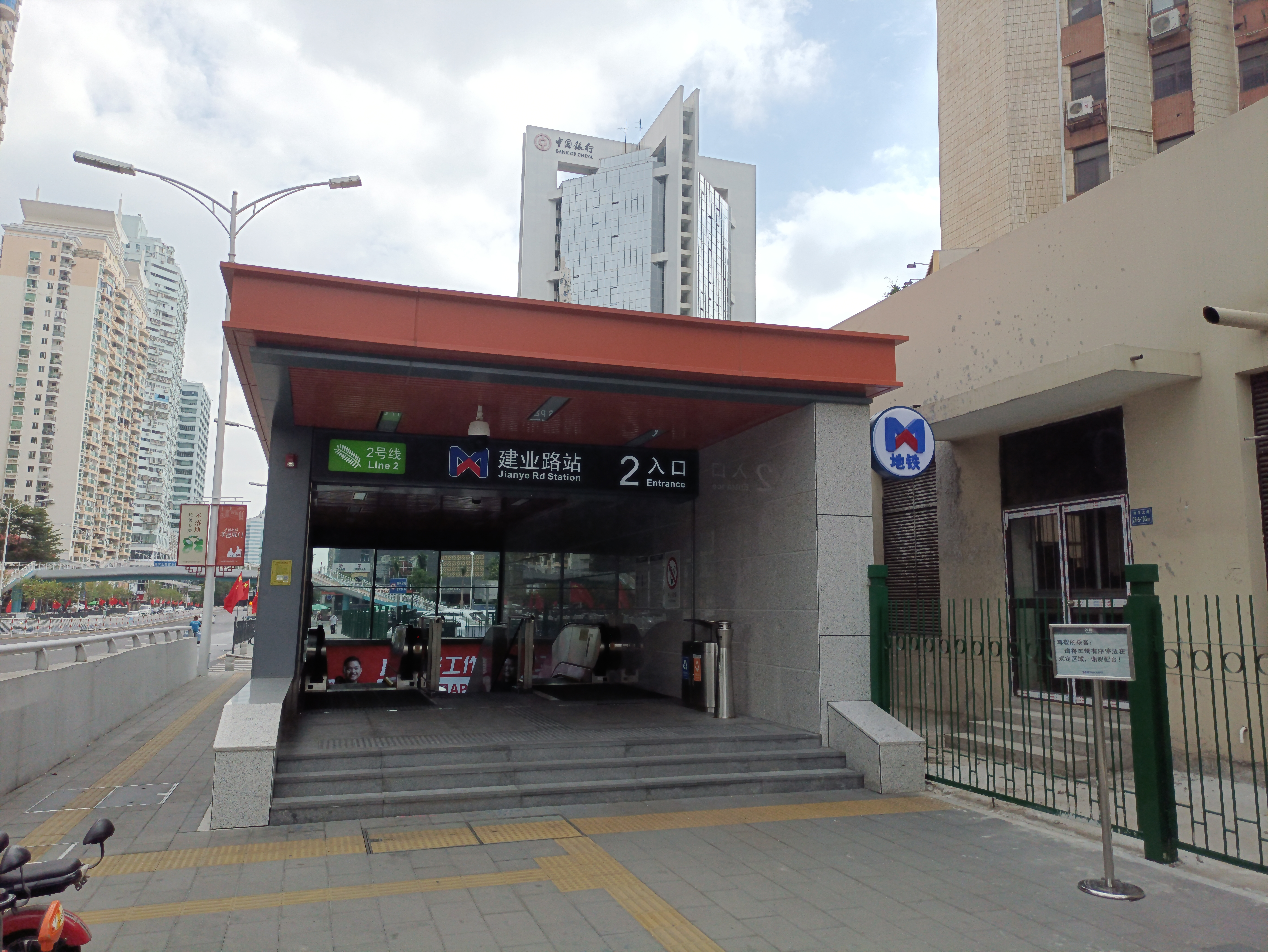 建业路站2号出口